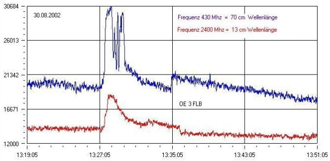 Die Aufzeichnung einer Sonneneruption